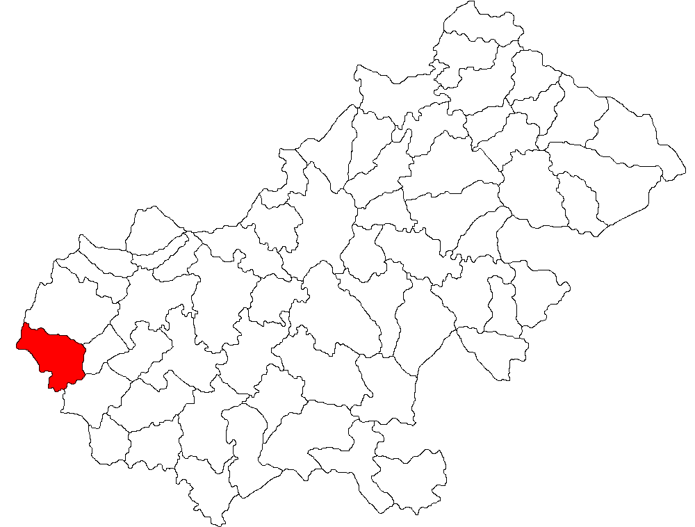 Categorie:Hărţi ale judeţului Satu Mare